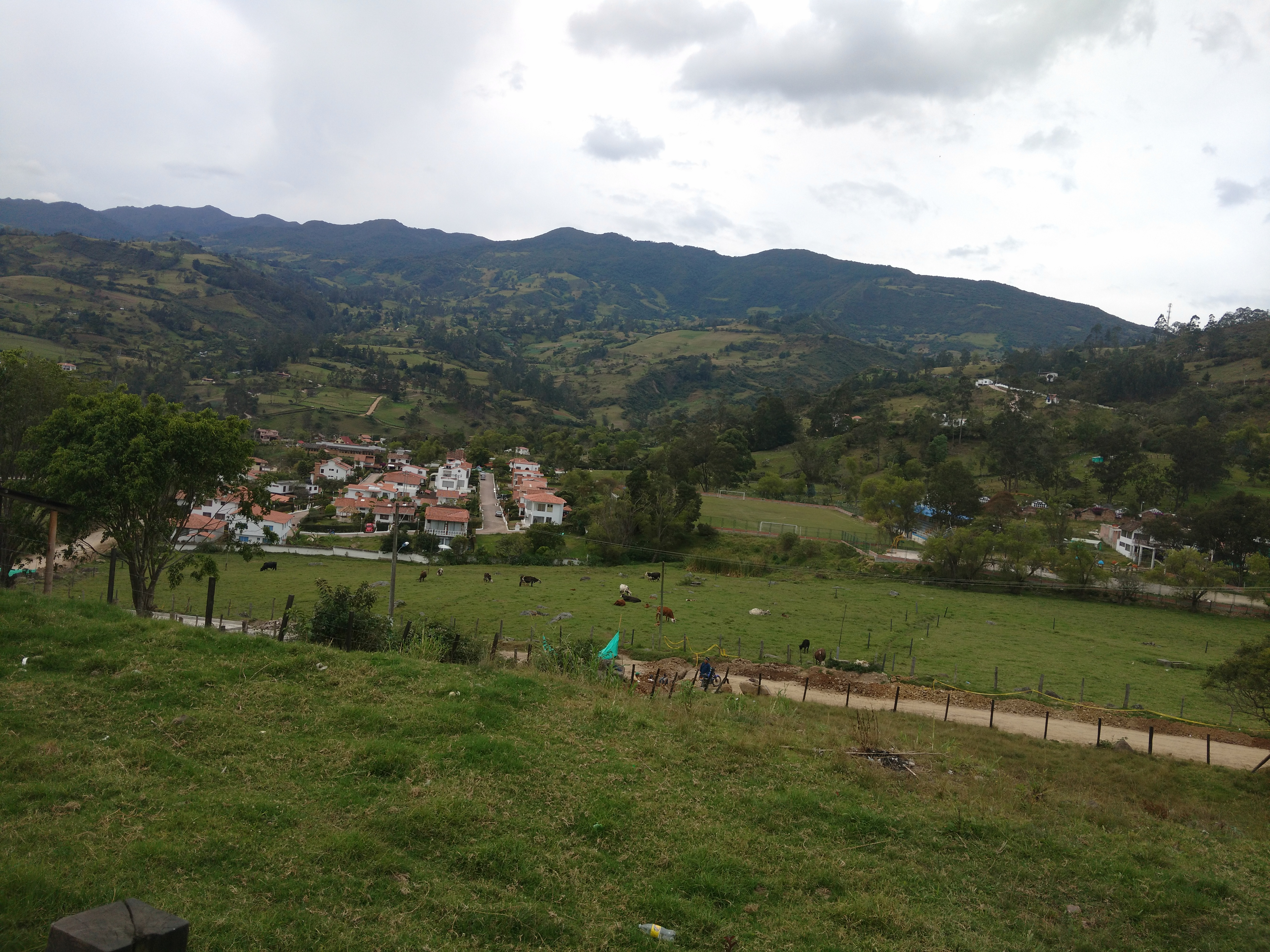 Esta fotografía fue tomada en el municipio colombiano con código 25426.